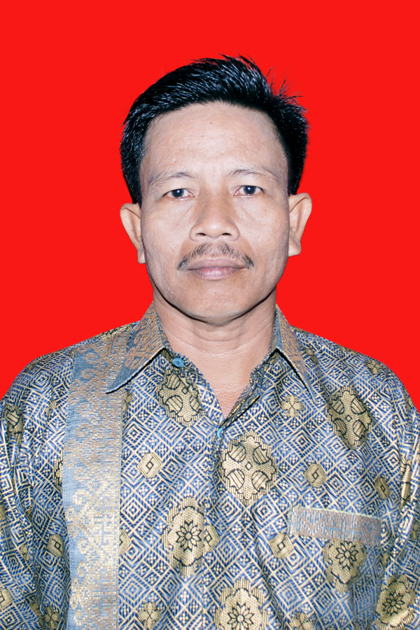 Jakpar Tarigan